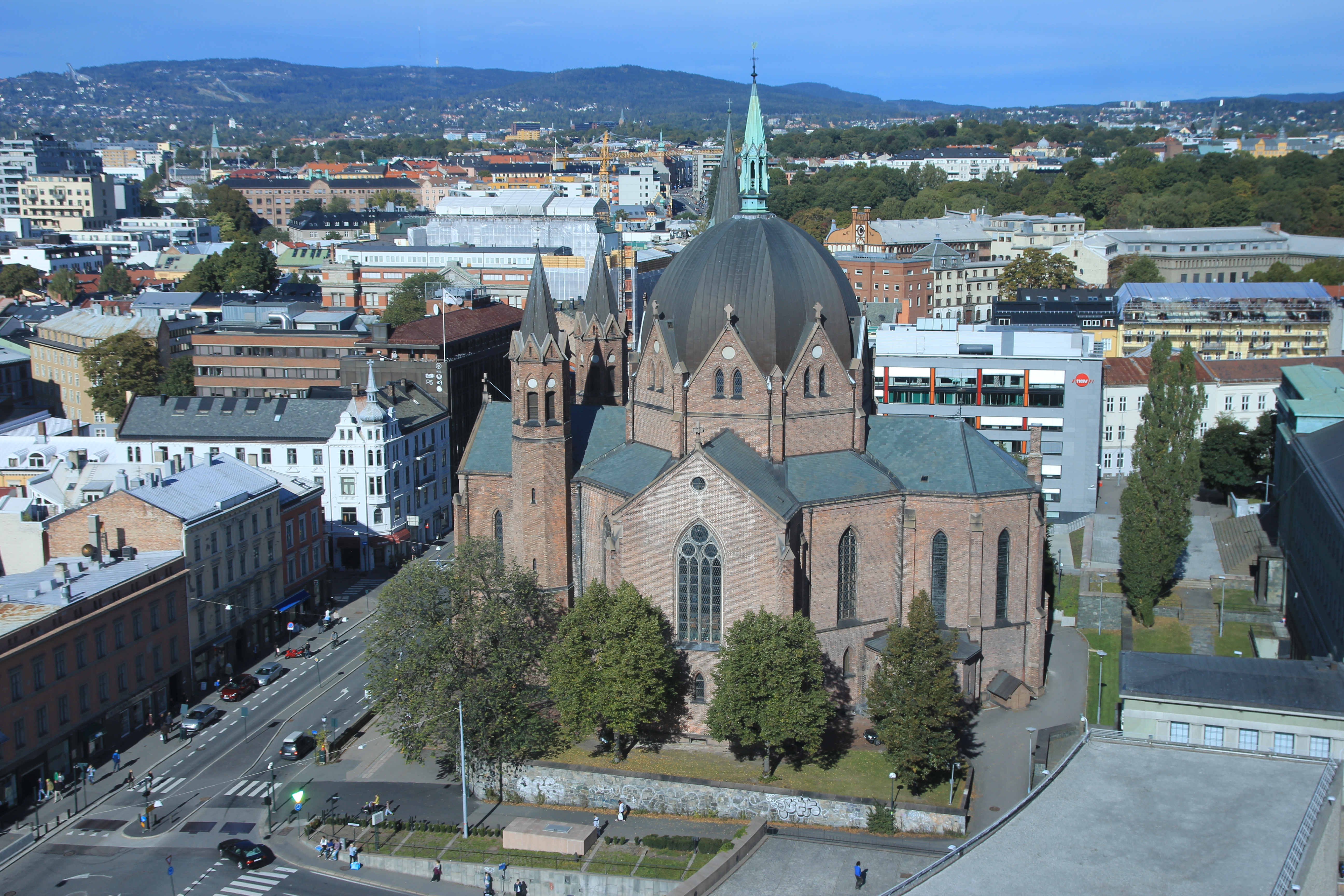 Trefoldighetskirken ble innviet i 1858. Den er en sentral storbykirke på Hammersborg i Bydel St. Hanshaugen i Oslo.